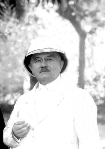 L'archeologo francese Louis Finot